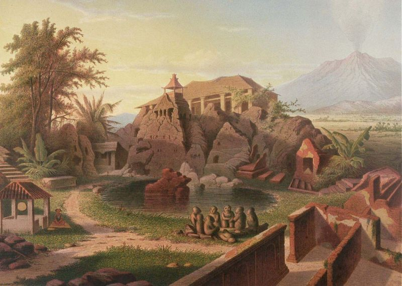 Litho. Litho naar een tekening van Wilsen. Pagina 8 van de map "De Indische Archipel", Den Haag, 1865-1876, met daarin 24 kleurenlitho's, van objectnr. 3728-430 t/m 3728-479.. Sunggi Ragi, de lusthof van de koningen van Cirebon